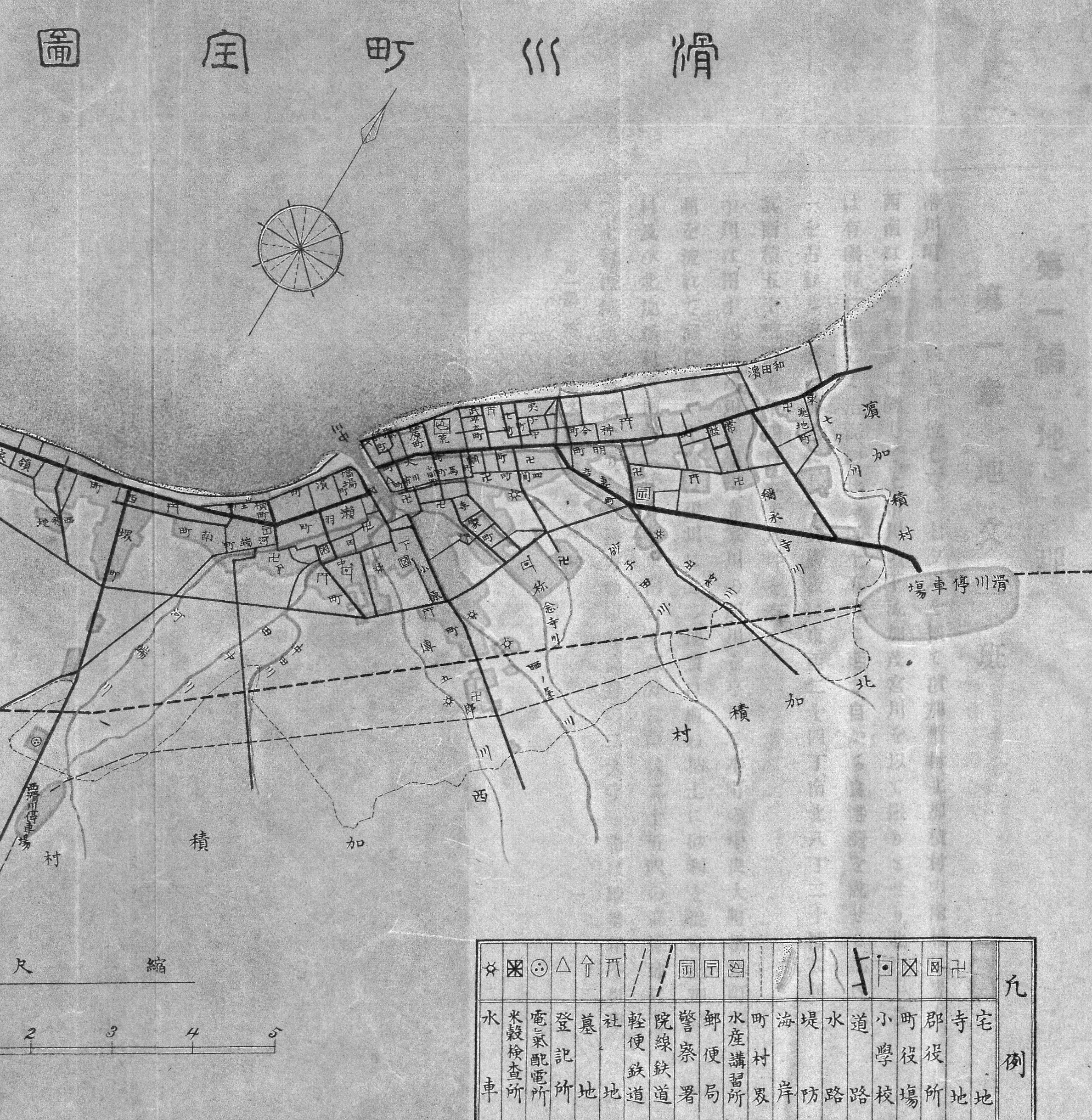 1913年（大正2年）の「滑川町全図」。